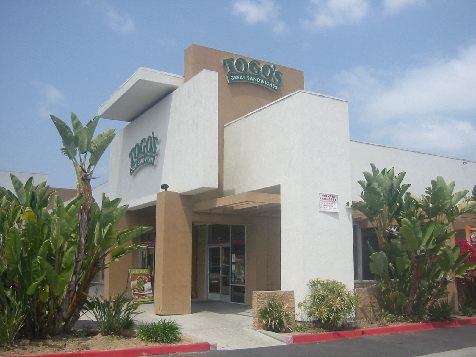 Togos restaurant in Los Angeles, California